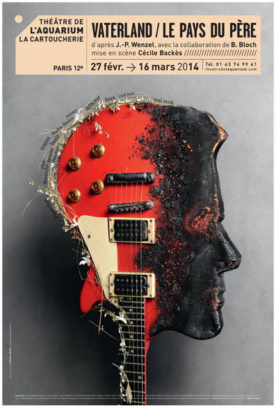 affiche théâtre de l'aquarium la cartoucherie